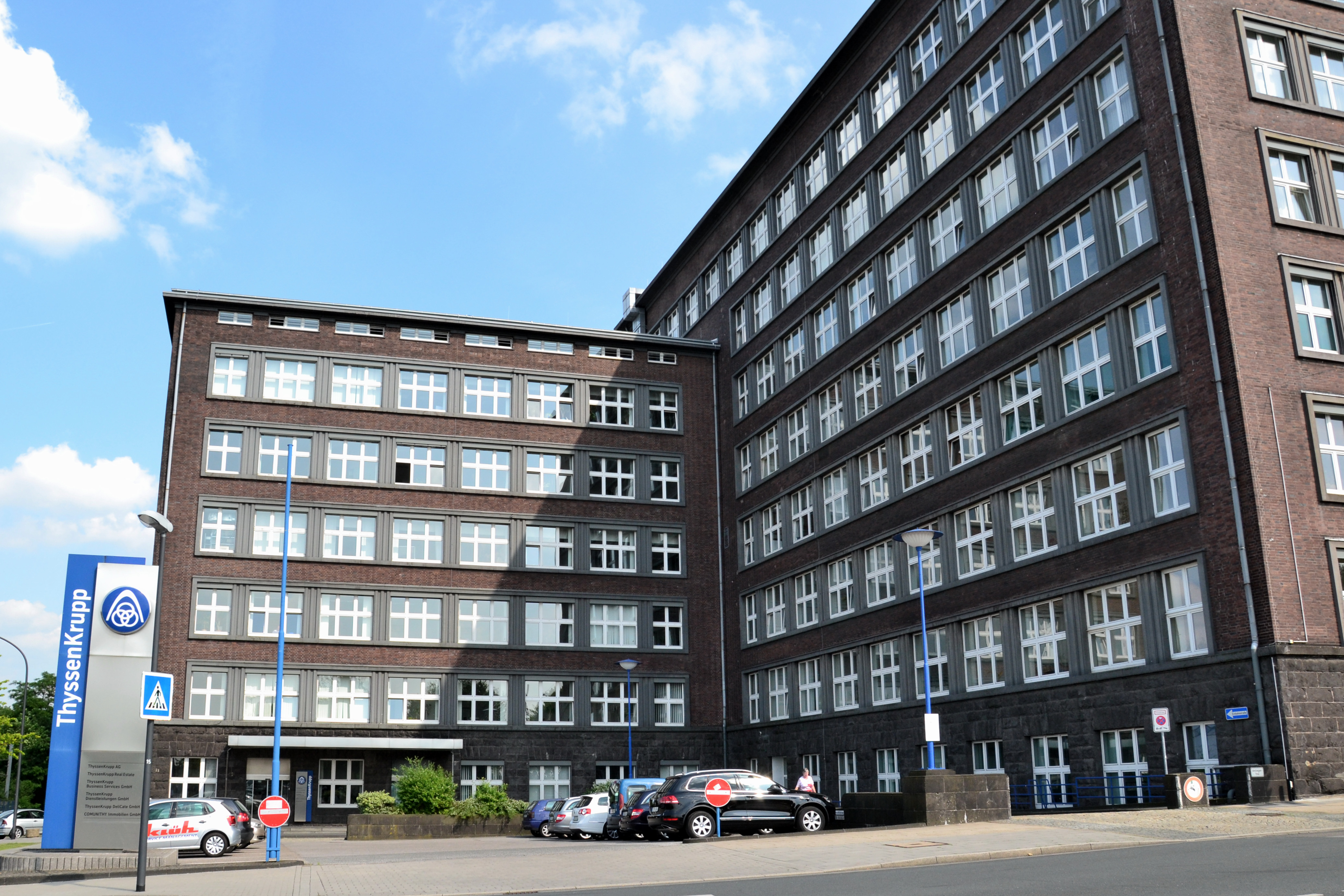 alte Krupp-Hauptverwaltung in Essen, erbaut 1938